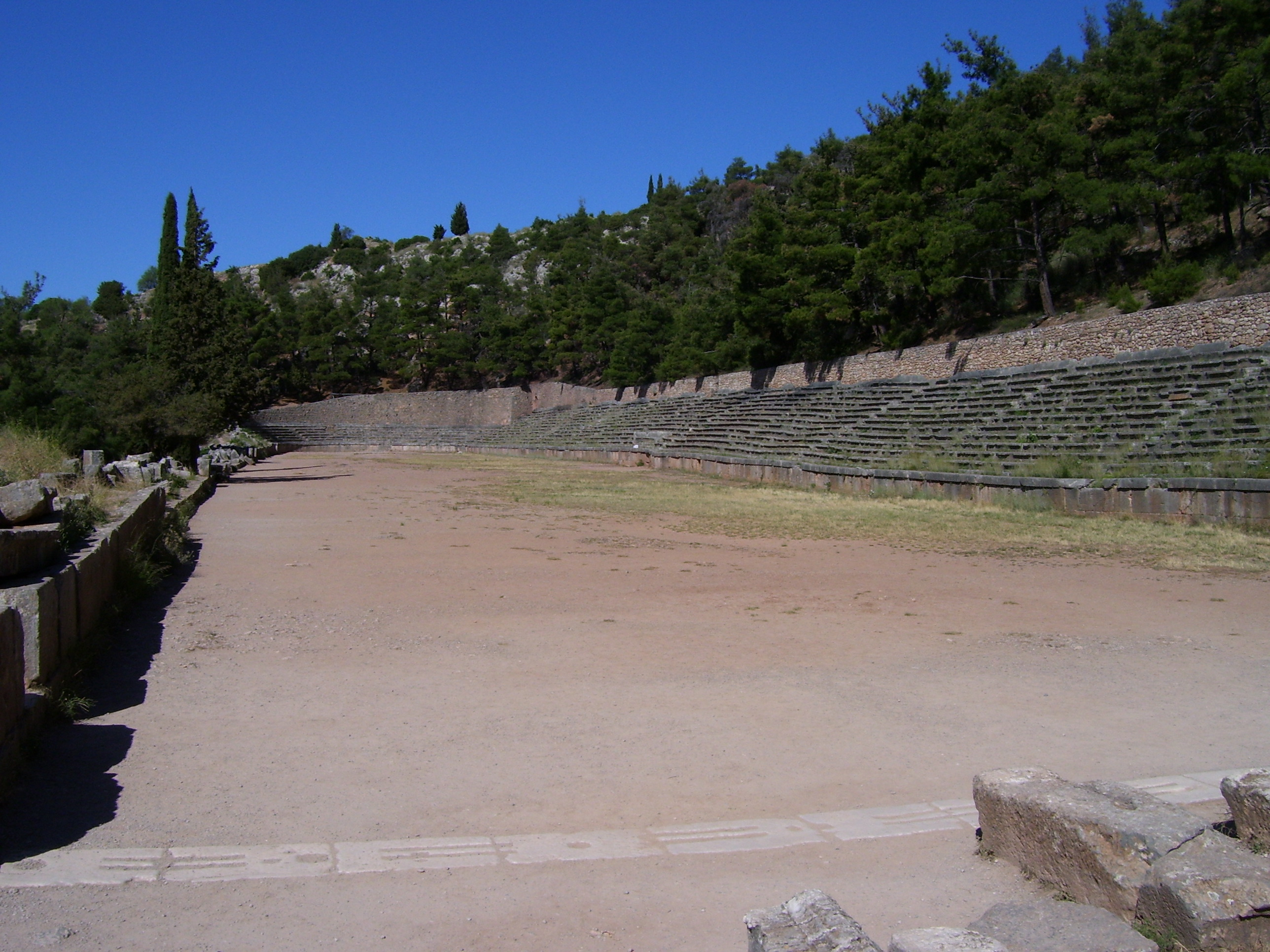 Stade de Delphes (Grèce)